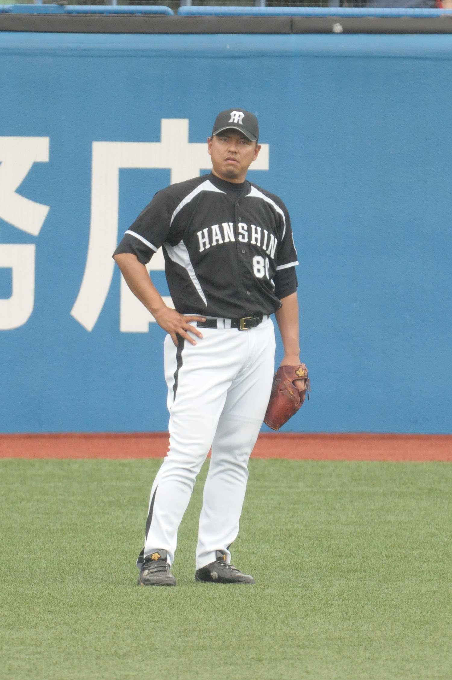 阪神タイガース、藪恵壹コーチ。神宮球場で。